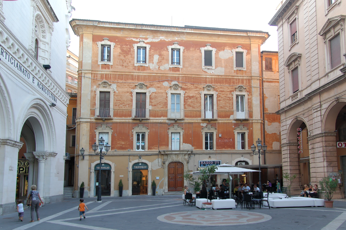 Chieti City 2011